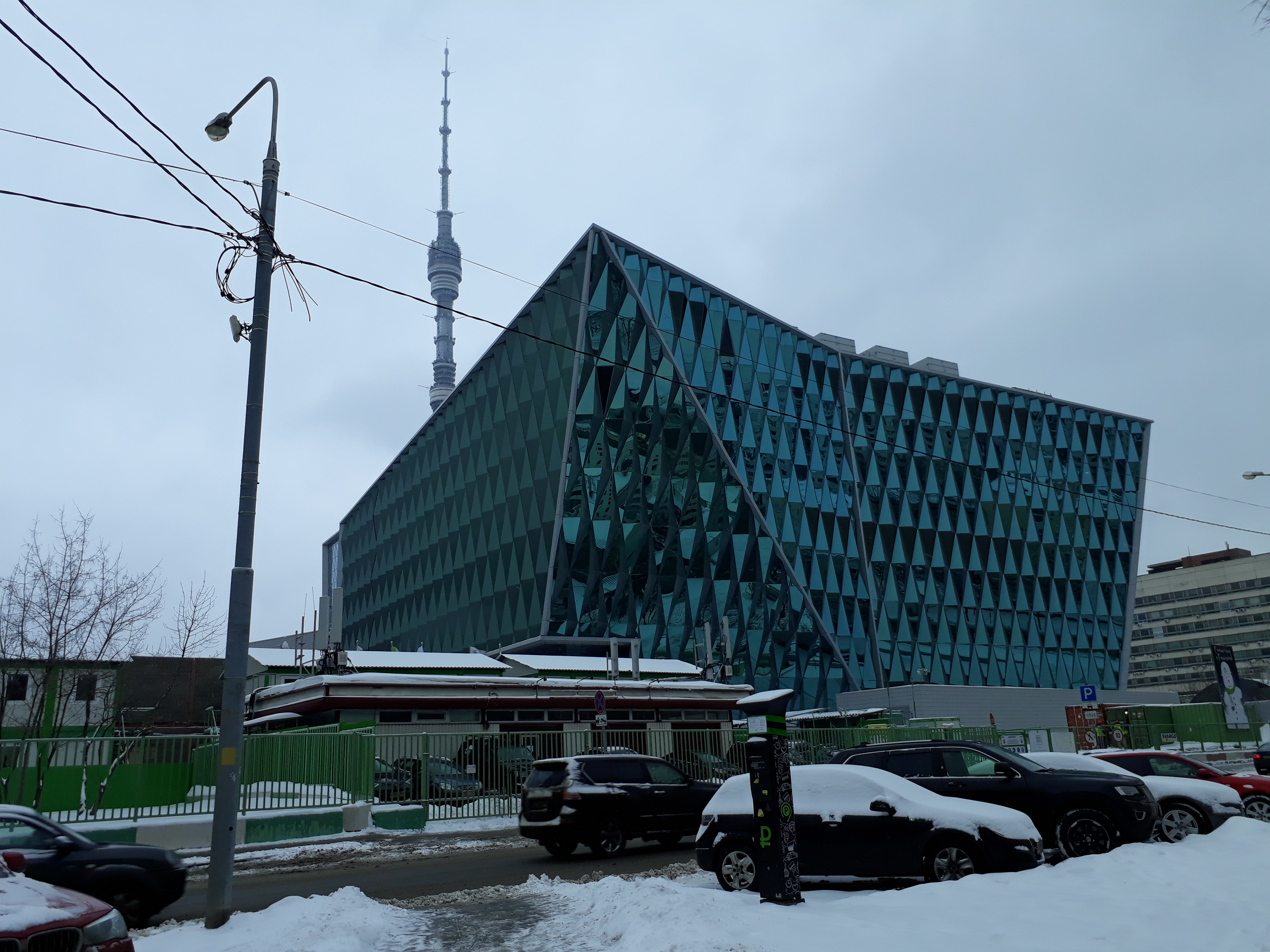 Здание телецентра НТВ на Аргуновской улице. 13 января 2017г.